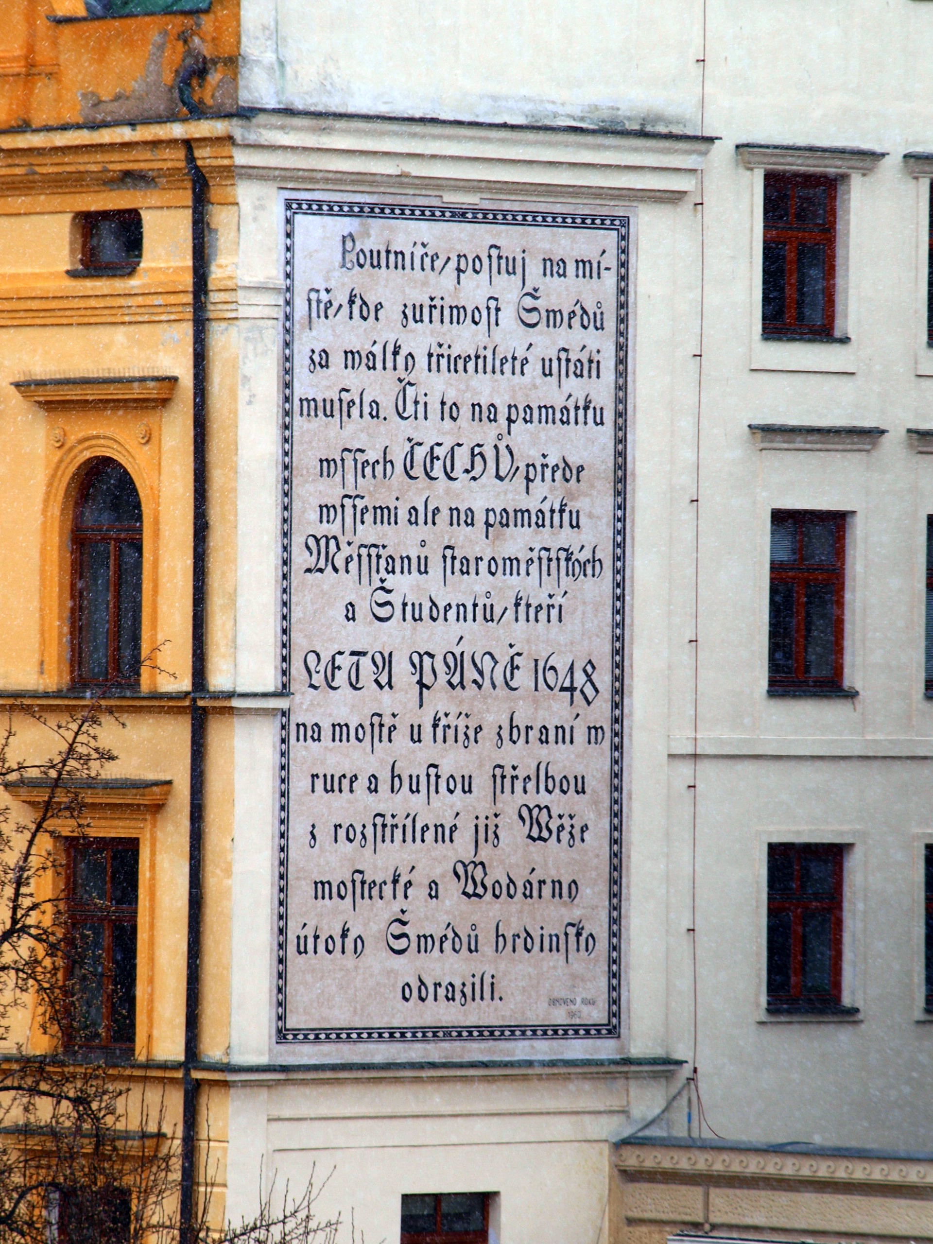 Karlův most pomník odporu proti Švédům